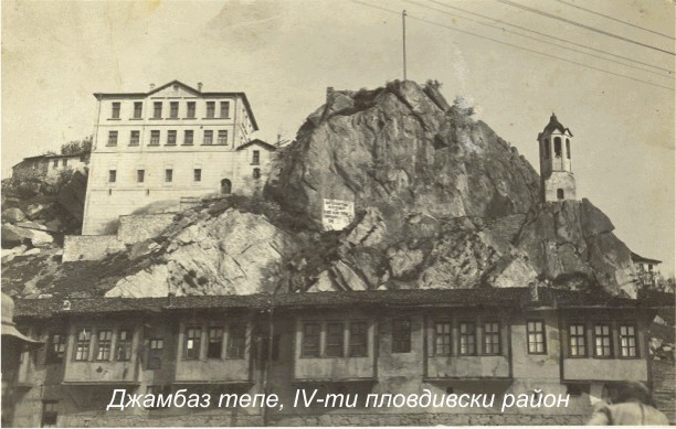 4ти Пловдивски район